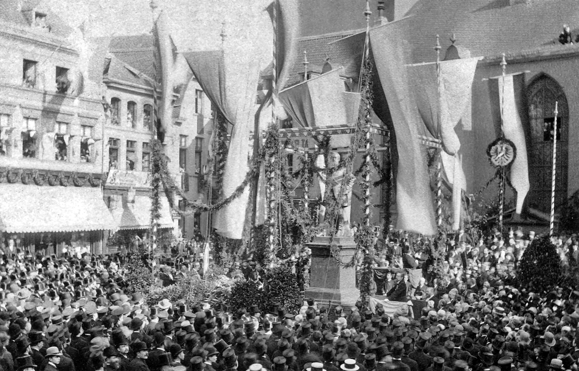 Einweihungsfeier des Alfred-Krupp-Denkmals an der Marktkirche in Essen; Oberbürgermeister Erich Zweigert hält, auf dem Bild rechts neben dem Denkmalsockel, gerade die Eröffnungsrede.